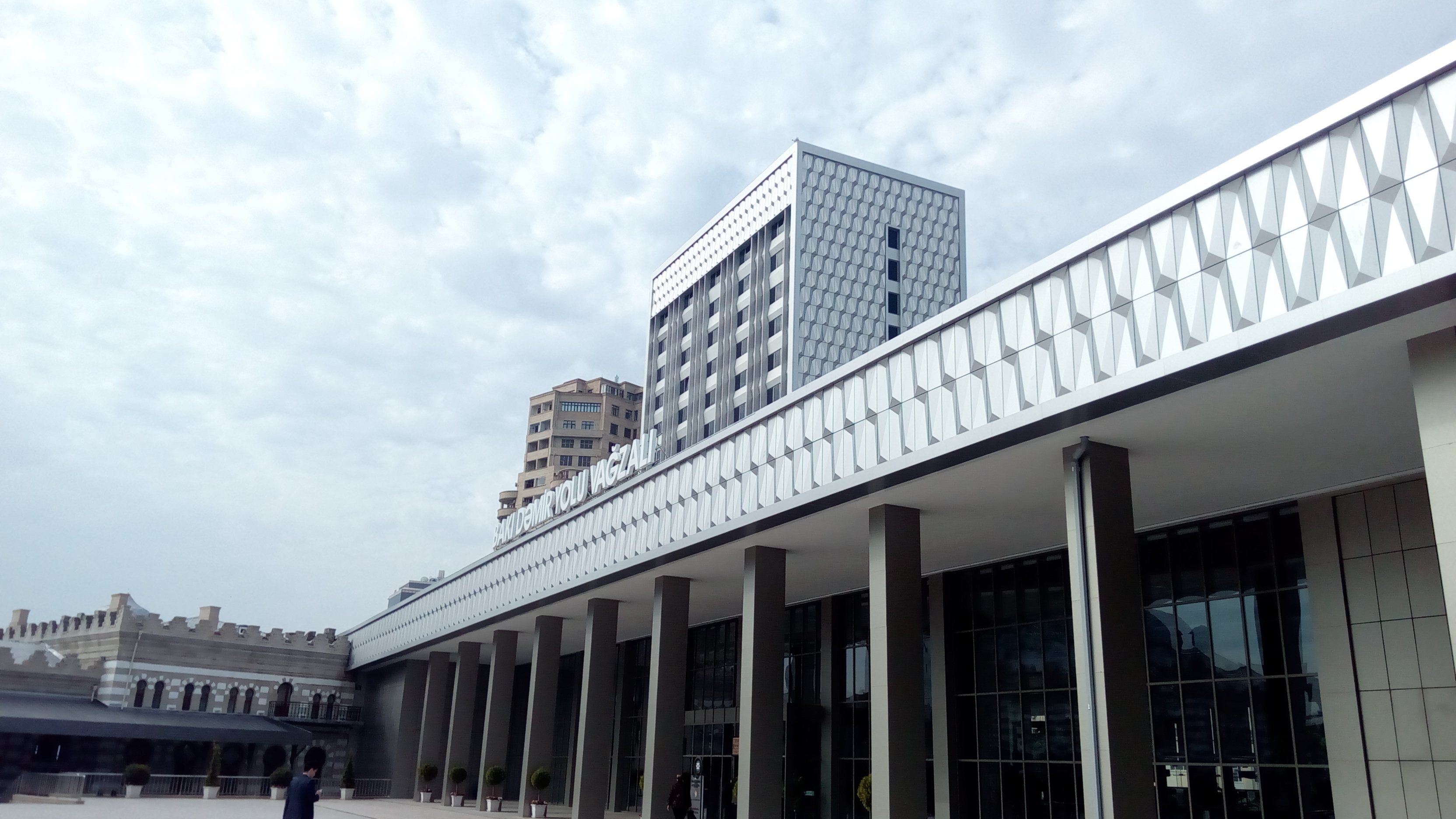 Bakı Dəmir Yolu Vağzalı